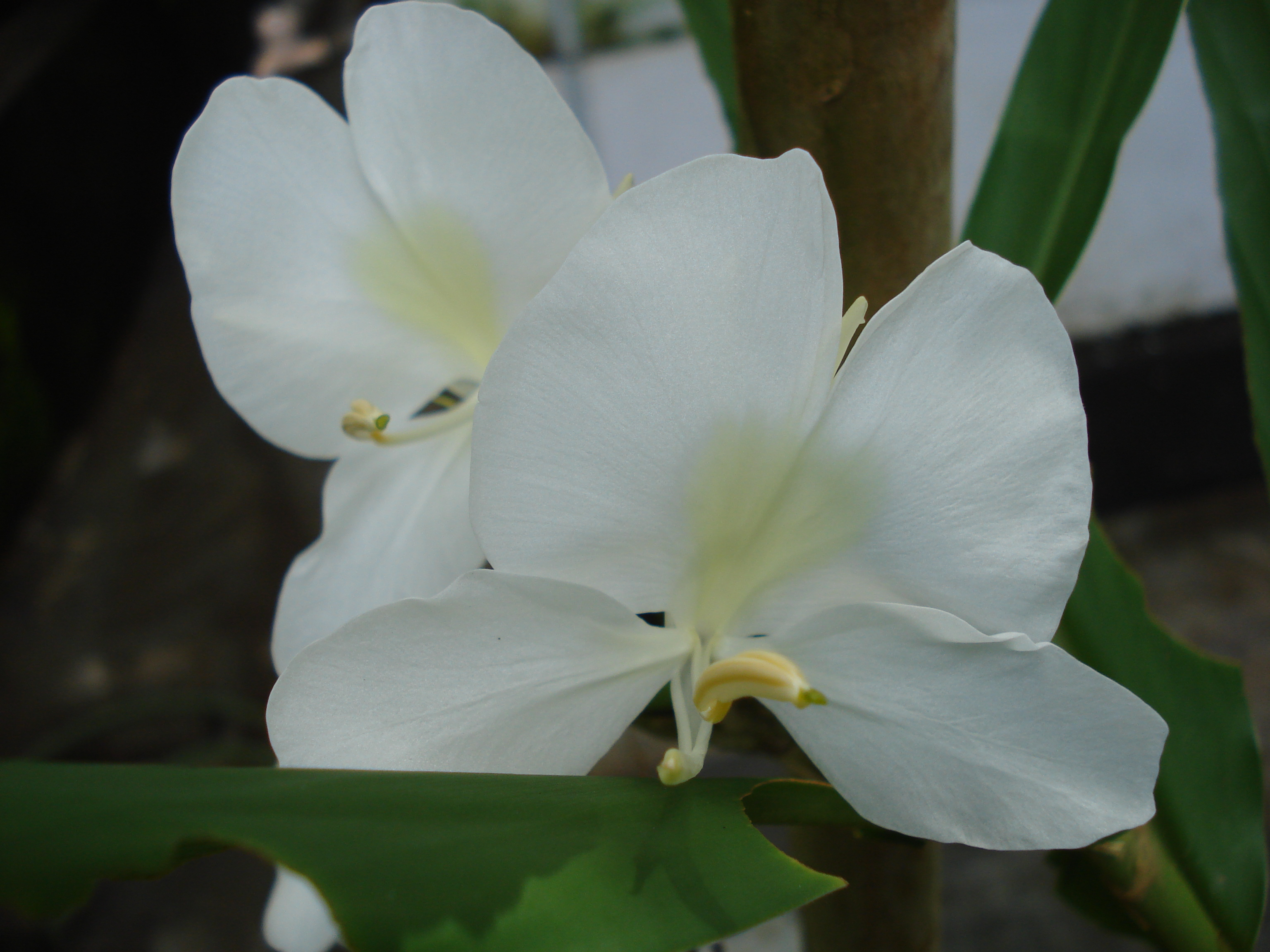 Kalyana sougandhikam flower